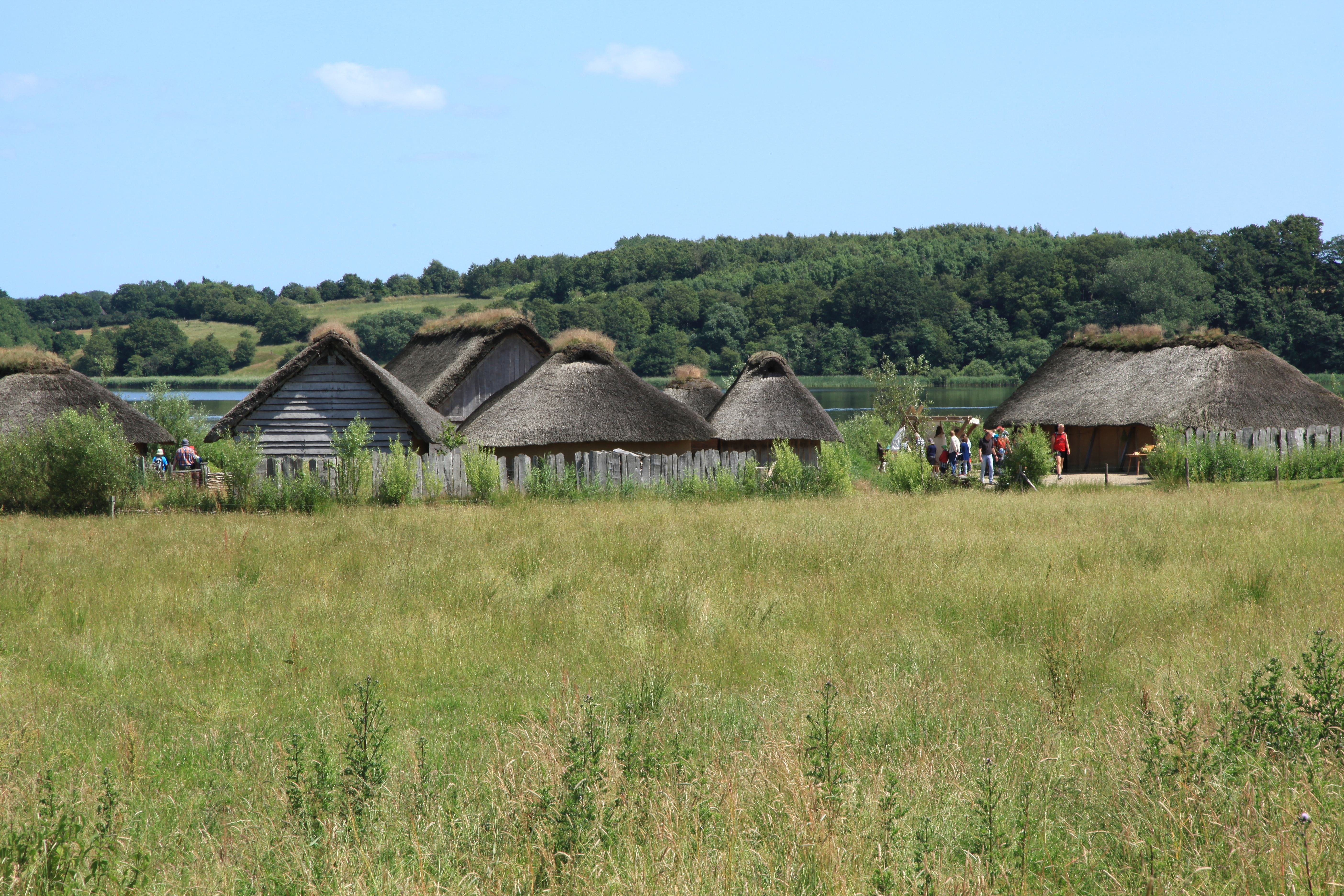 Freilichtmuseum: Rekonstruierte Wikinger-Häuser von Haithabu in Busdorf